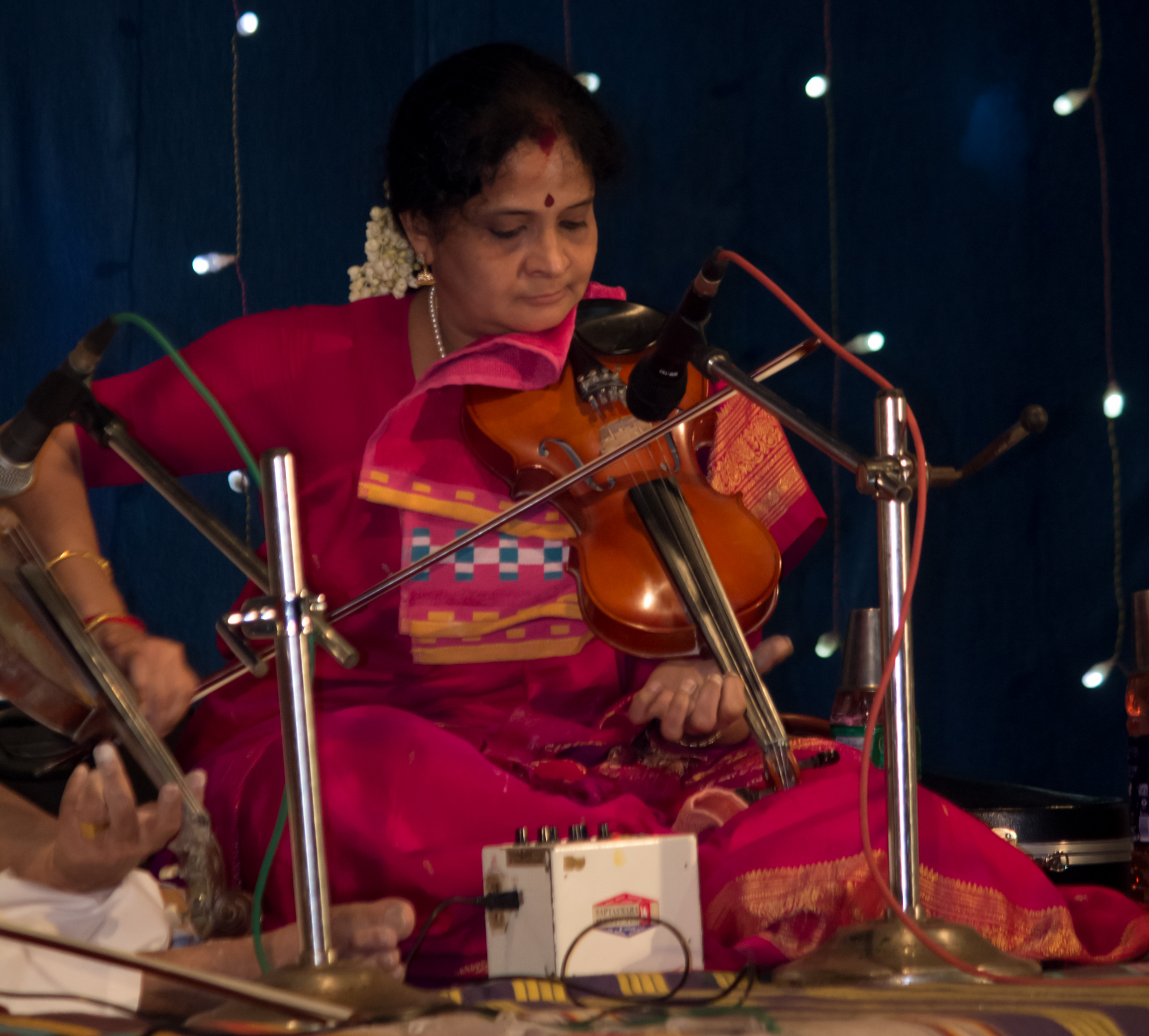 ചങ്ങമ്പുഴ പാർക്കിൽ നടന്ന ഇടപ്പള്ളി സംഗീതോൽസവത്തിനിടെ